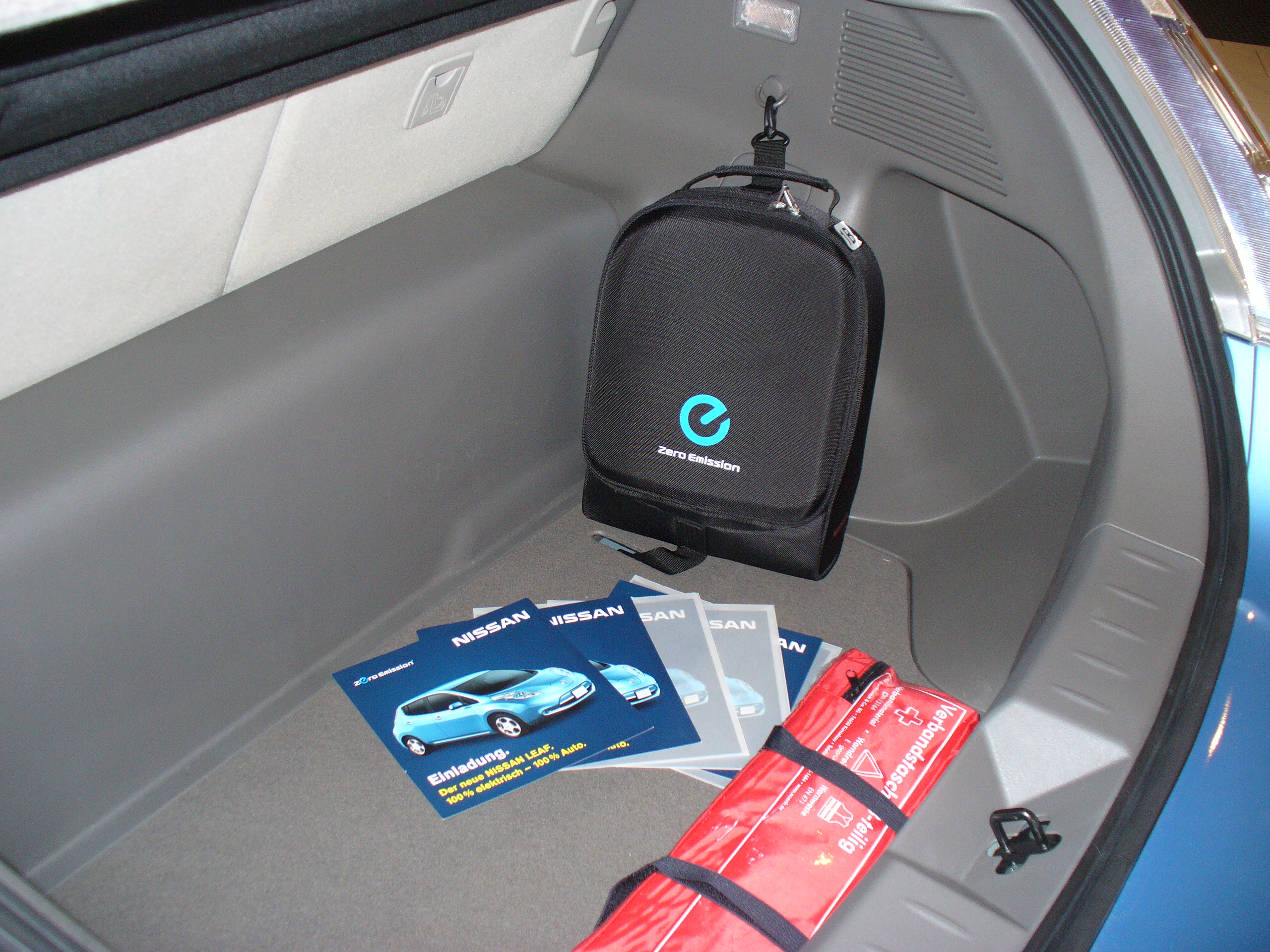 Nissan Leaf während der Fahrzeugvorstellung 2012 im Autohaus Dresden: Kofferraum mit Tasche für das Ladekabel